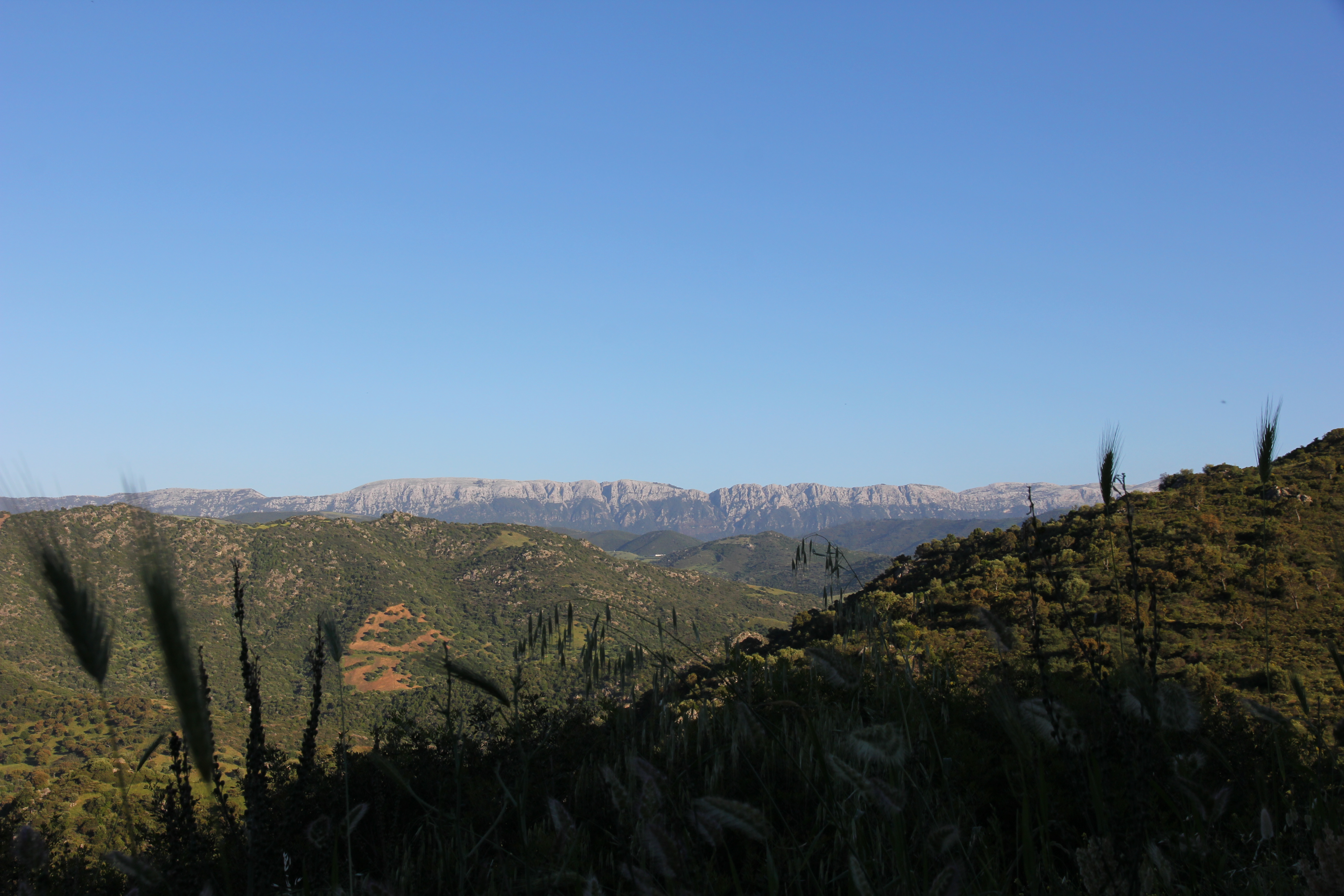 Lula, Siniscola - Catena del Montalbo